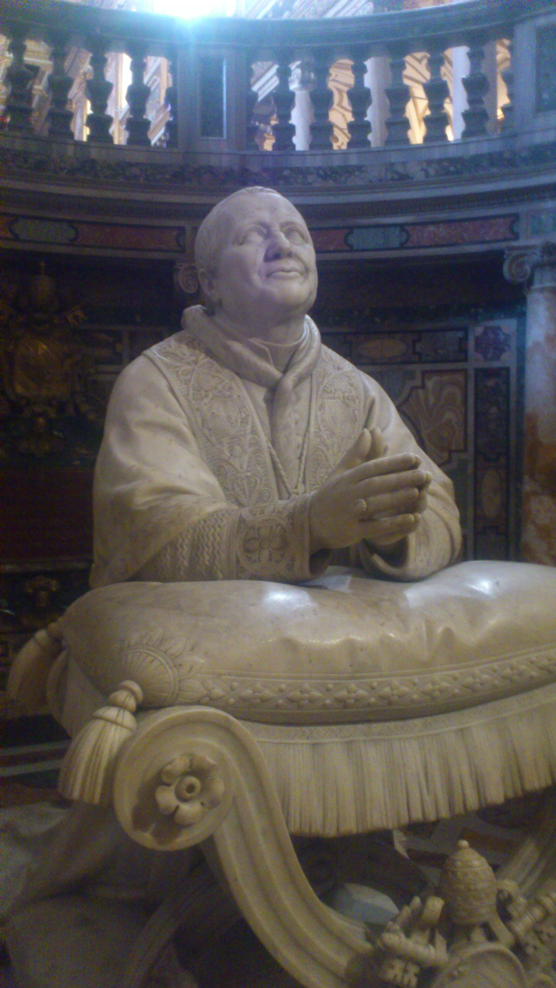 Le Pape Pie IX dans la basilique Sainte Marie Majeure à Rome, Italie